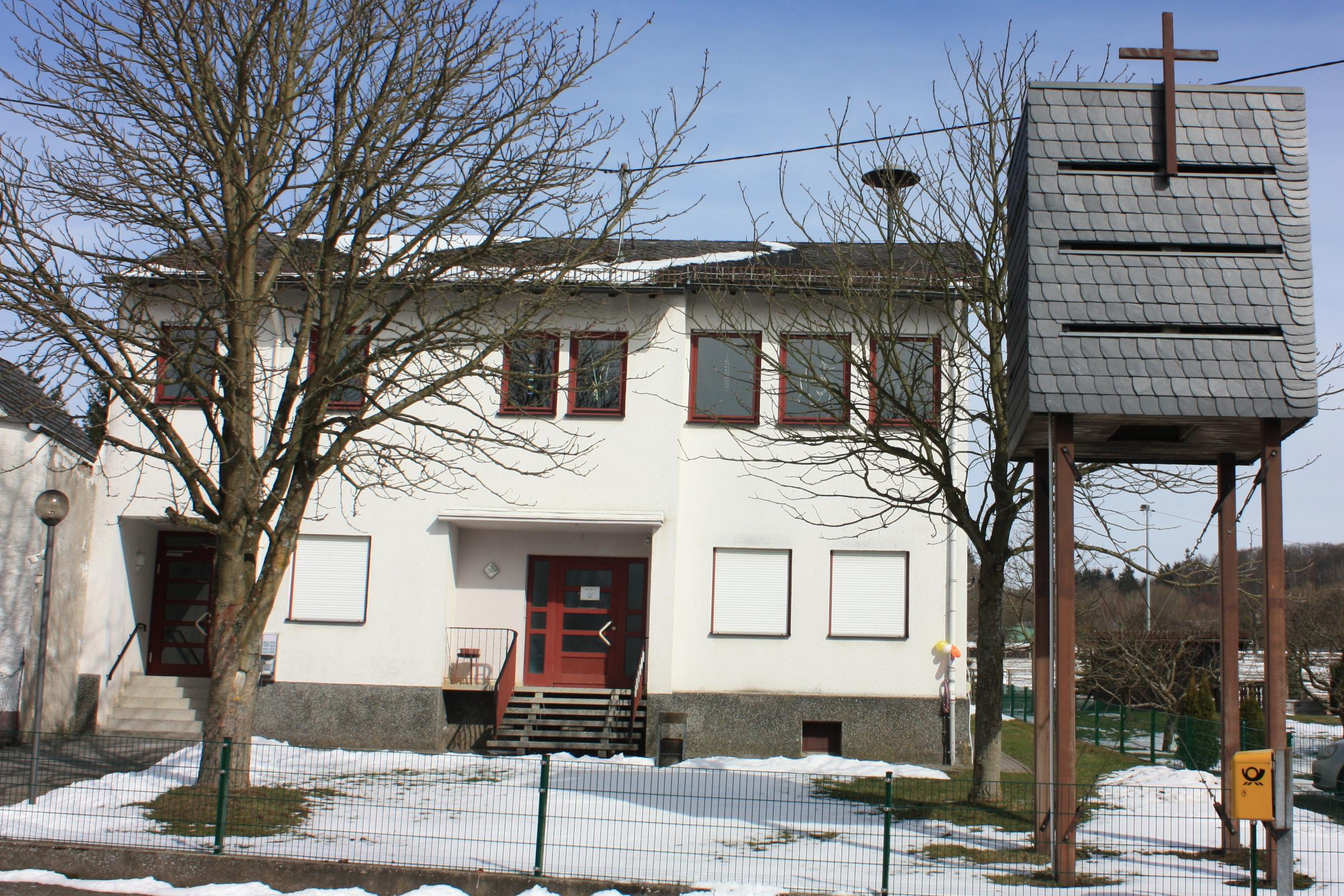 Dorfgemeinschaftshaus in Rückershausen, Merenberg